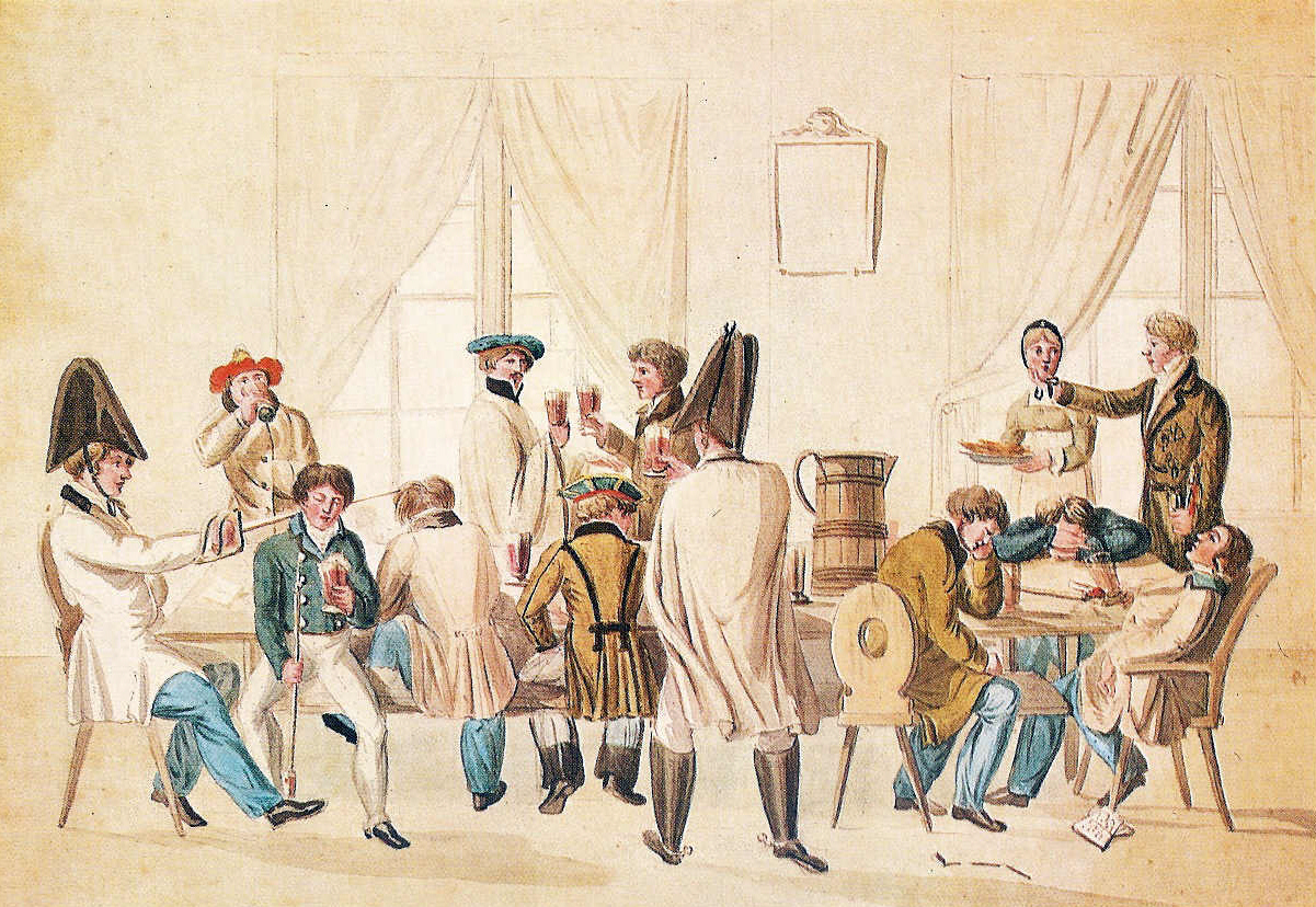 Studentische Kneipszene um 1810, Rechte abgelaufen, Public Domain